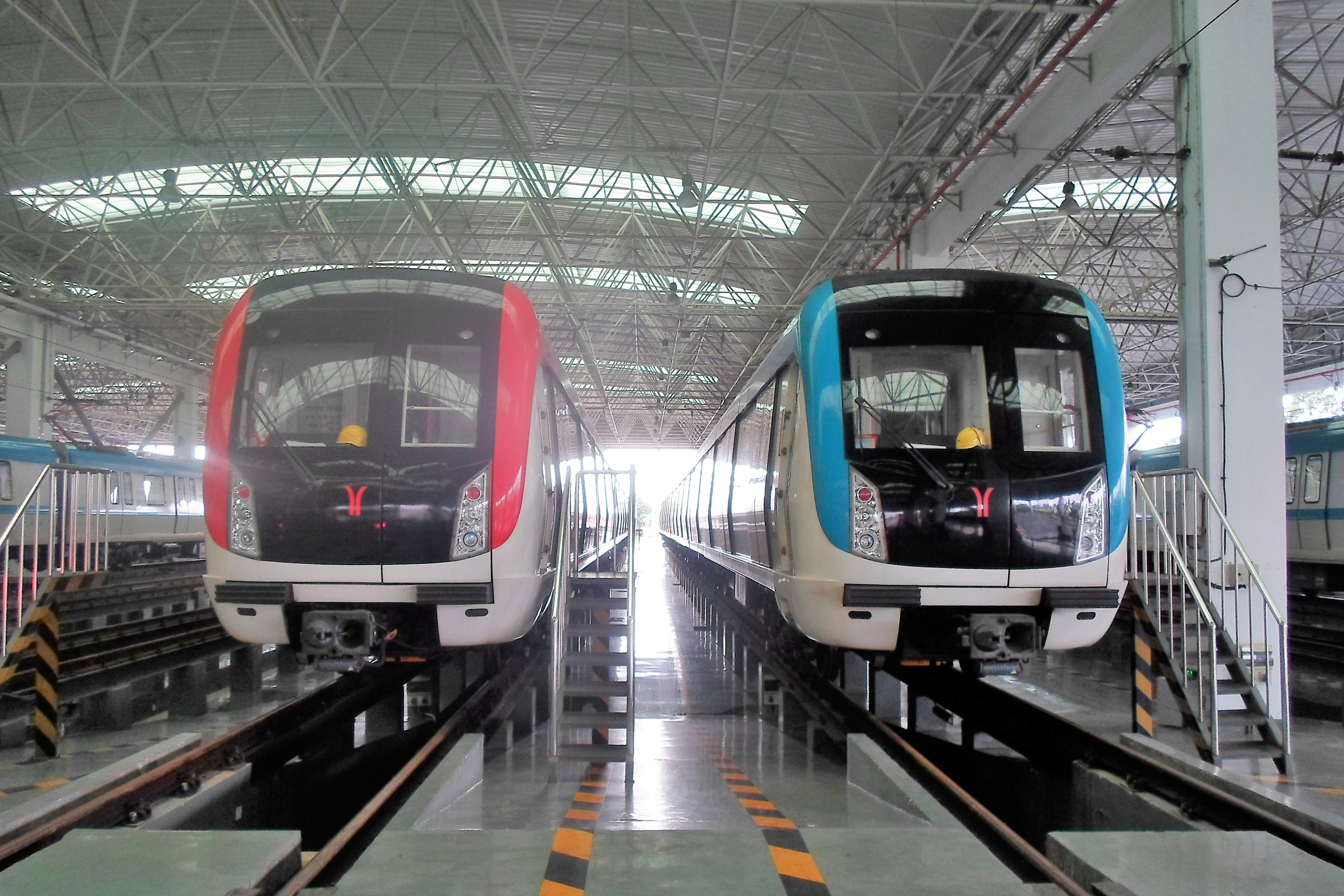 中文（中国大陆）: （DKZ29）